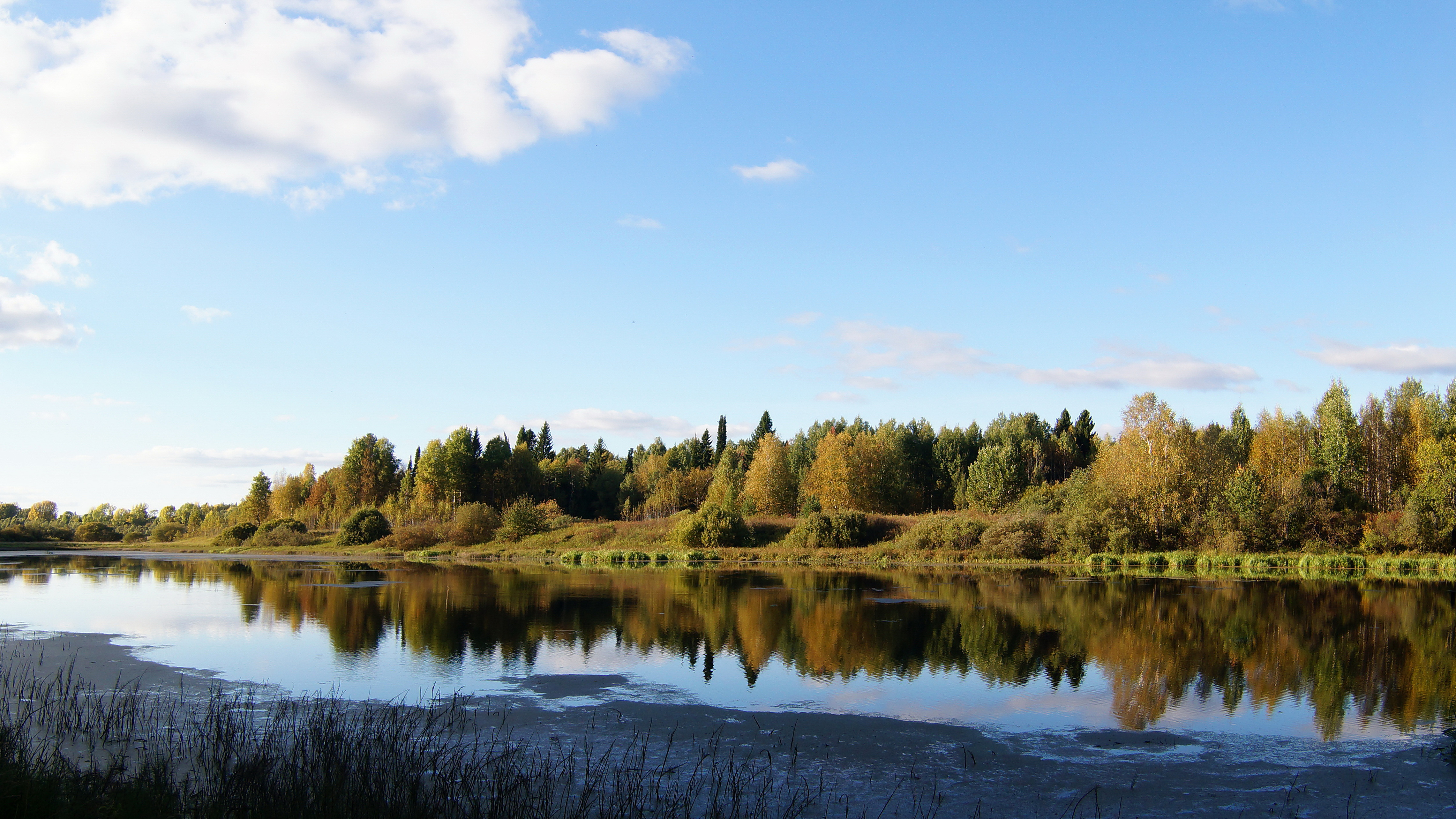 Артёмовское озеро: Кирово-Чепецкий район, Кировская область. This image is related to the protected area of Russia number 4310092